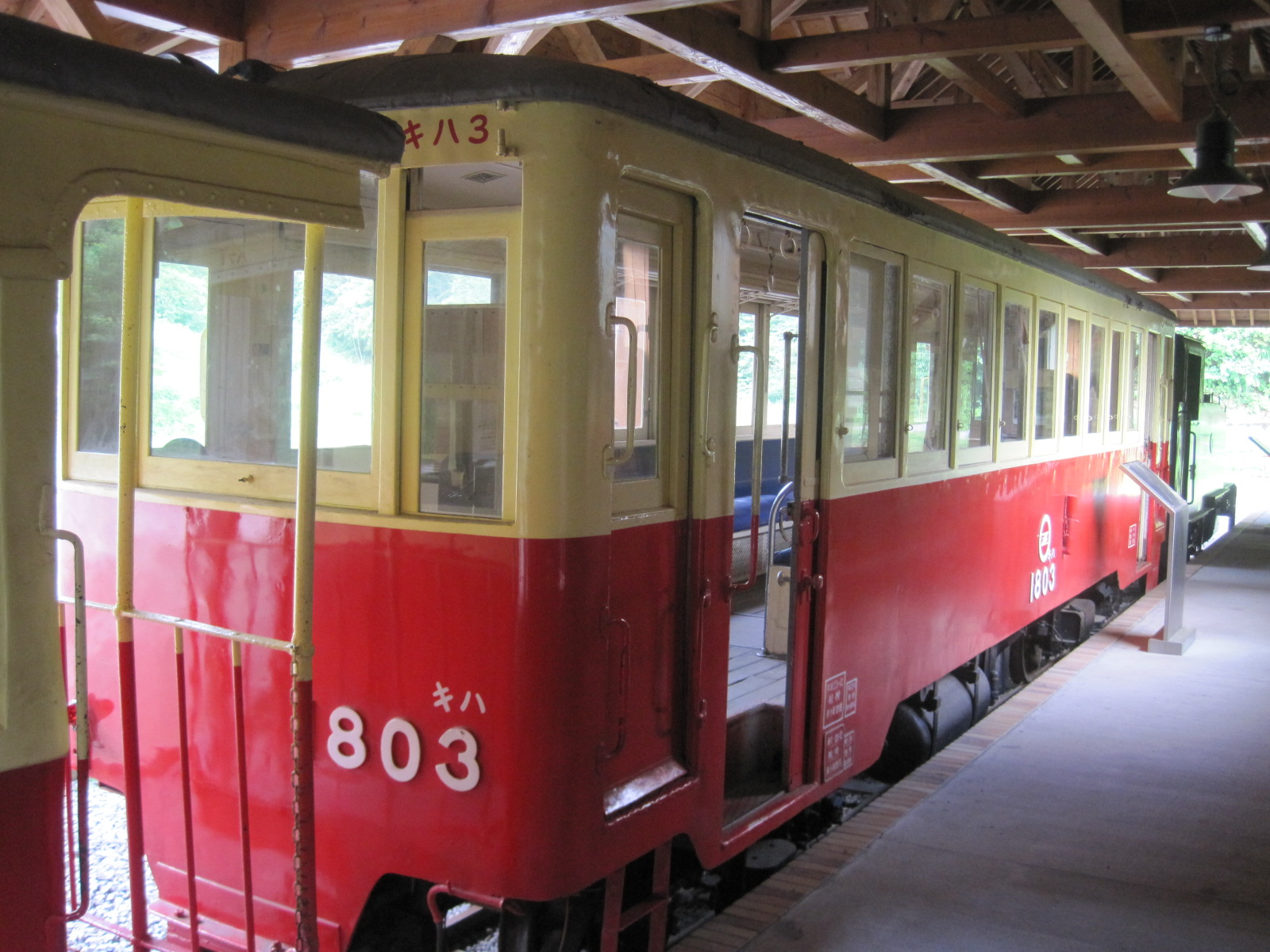 尾小屋鉄道の気動車キハ3。車体番号は遠州鉄道奥山線で使用時の1803が付けられている。